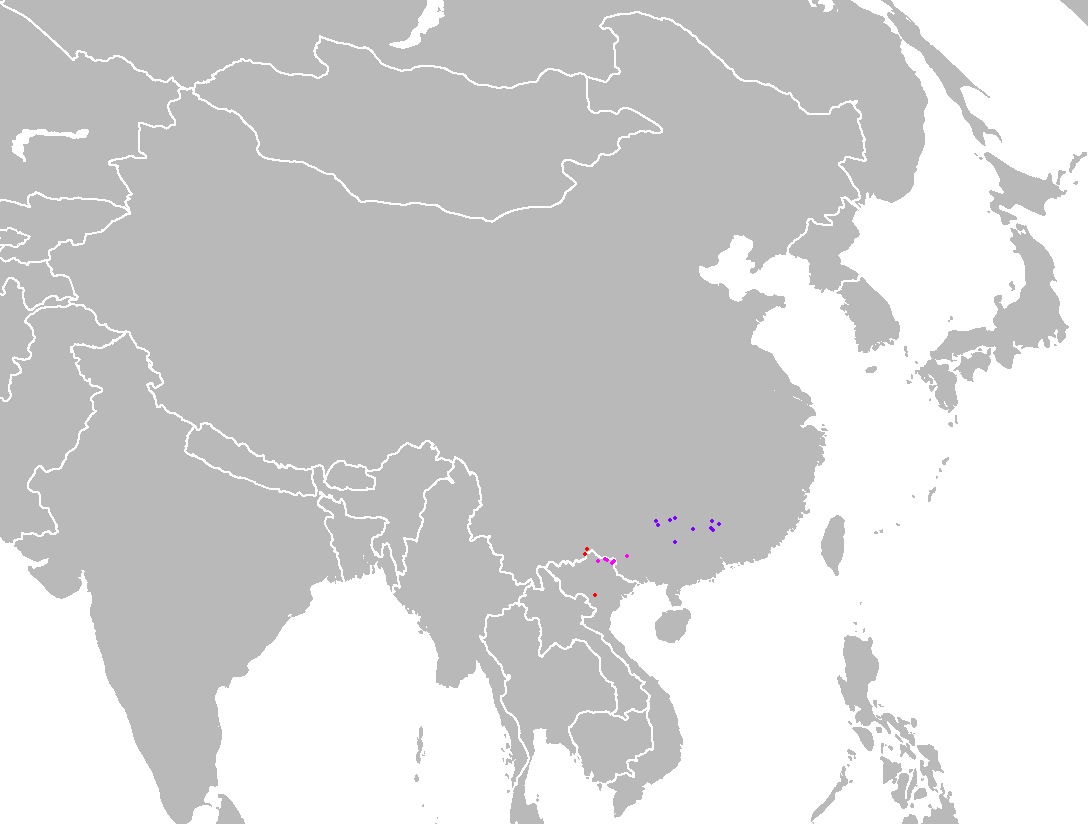 Range map of Pinus wangii Red: Pinus wangii subsp. wangii (including P. eremitana) Pink: Pinus wangii subsp. varifolia Purple: Pinus wangii subsp. kwangtungensis